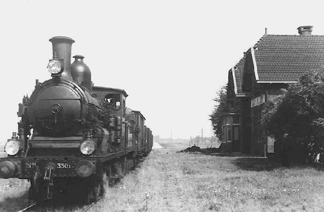 Station Ter Apelkanaal-Vetstukkenmond met locomotief NS 3301.